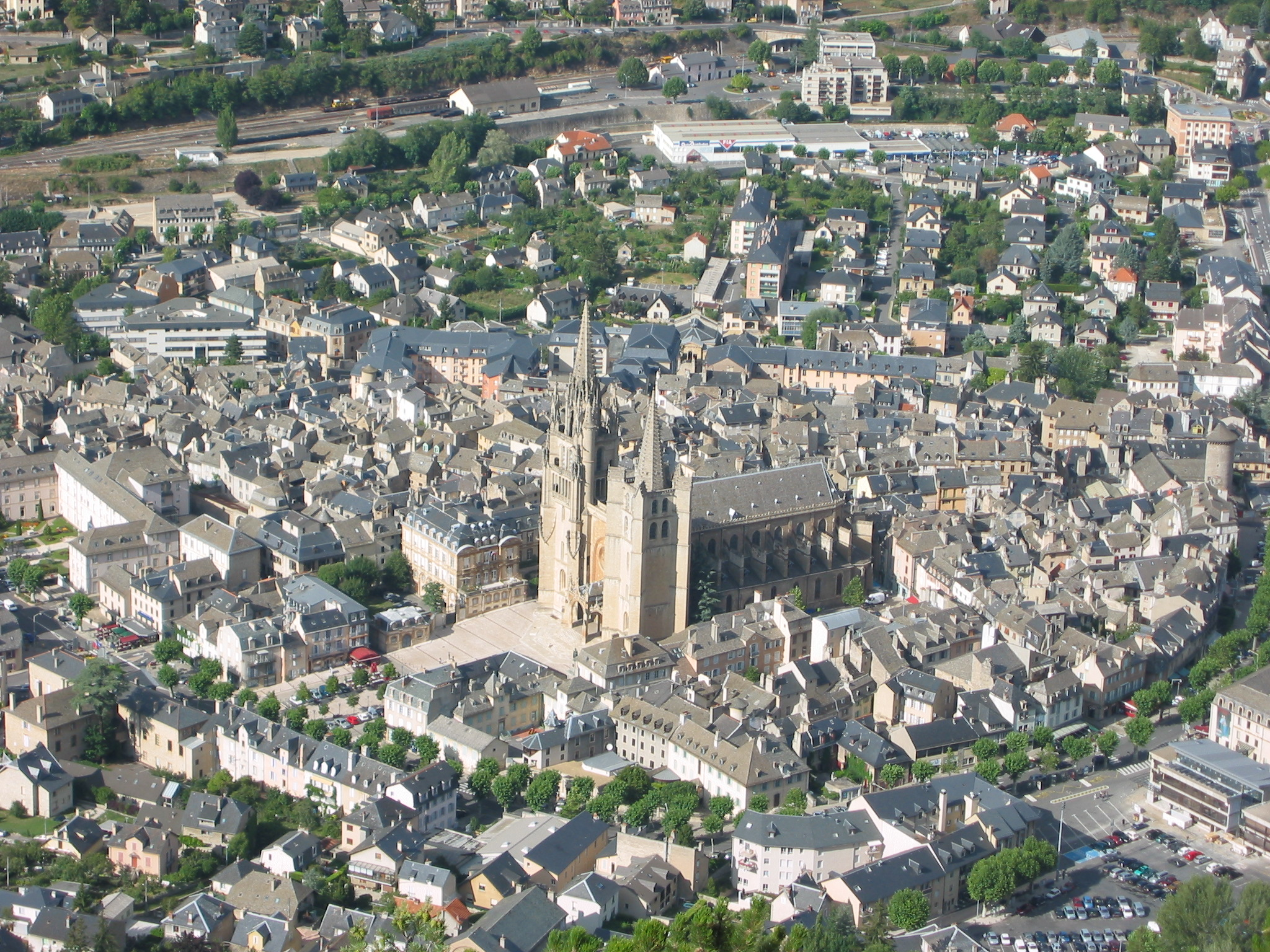 Mende, Lozère, France Vue de la ville autour de la cathédrale. Photo prise depuis la croix du Mont-Mimat.